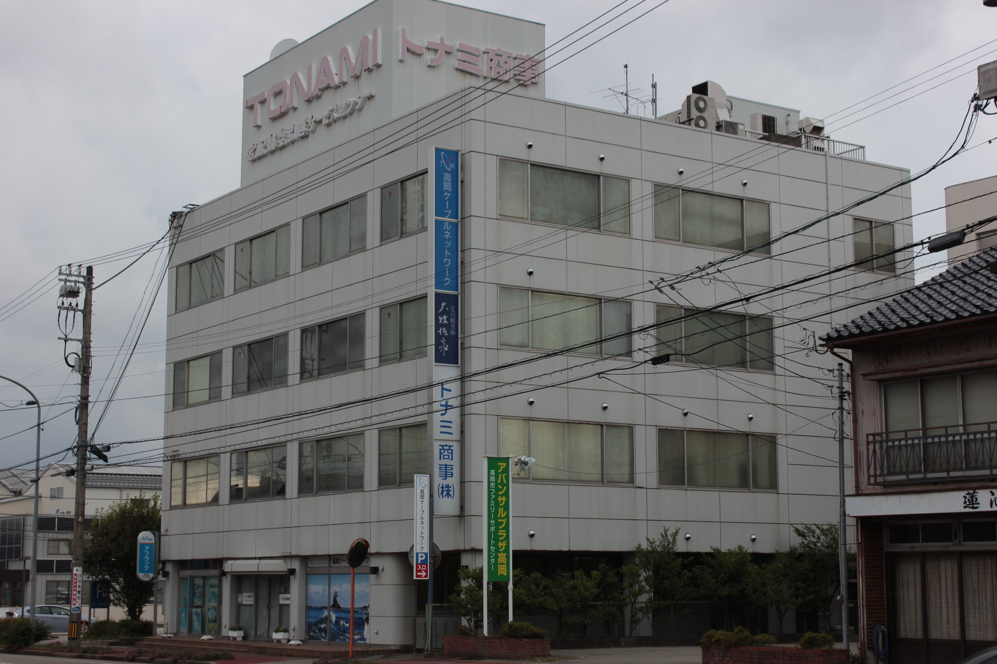 高岡ケーブルネットワーク本社（富山県高岡市） Canon EOS Kiss X5